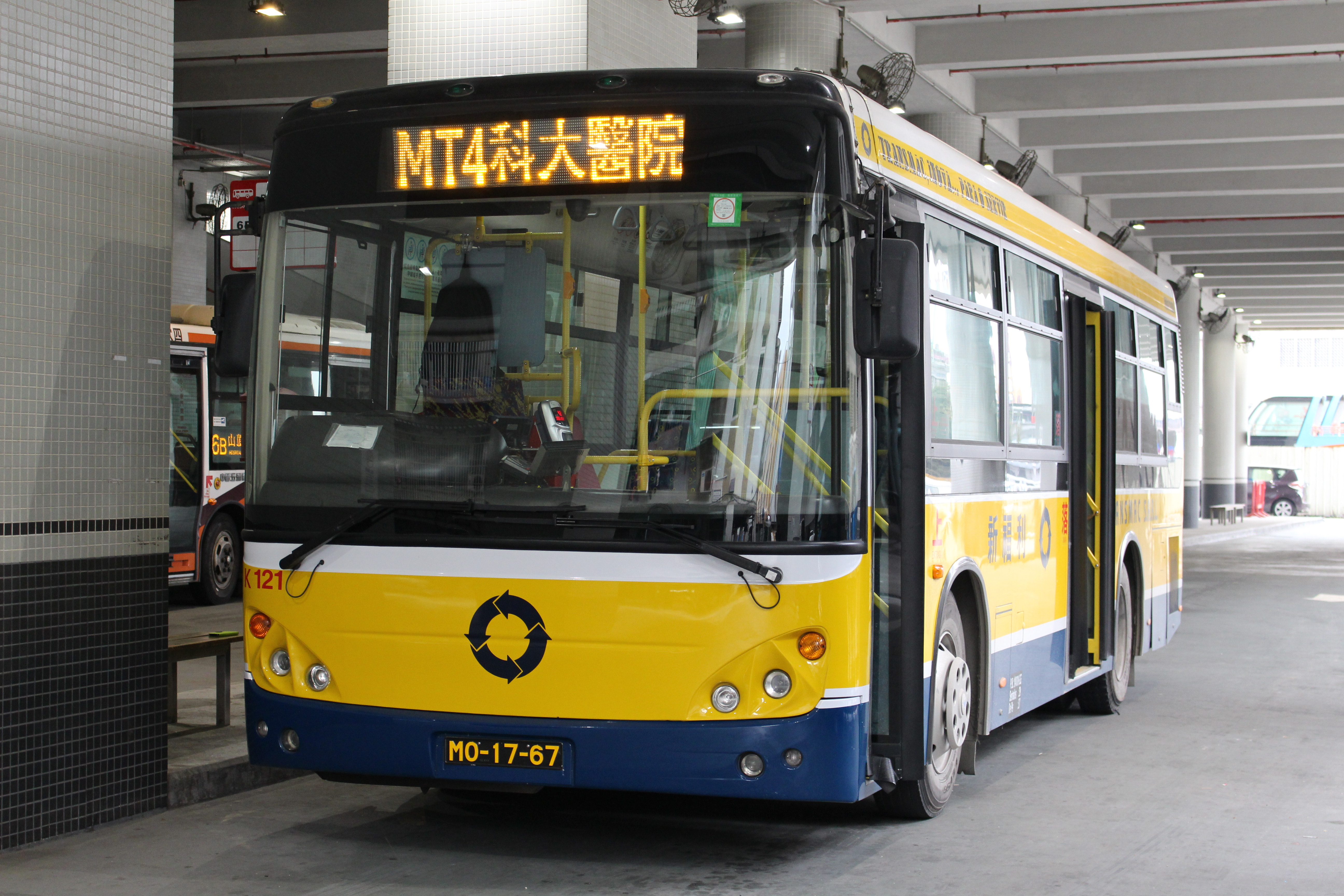 新福利蘇州金龍行駛MT4路線.